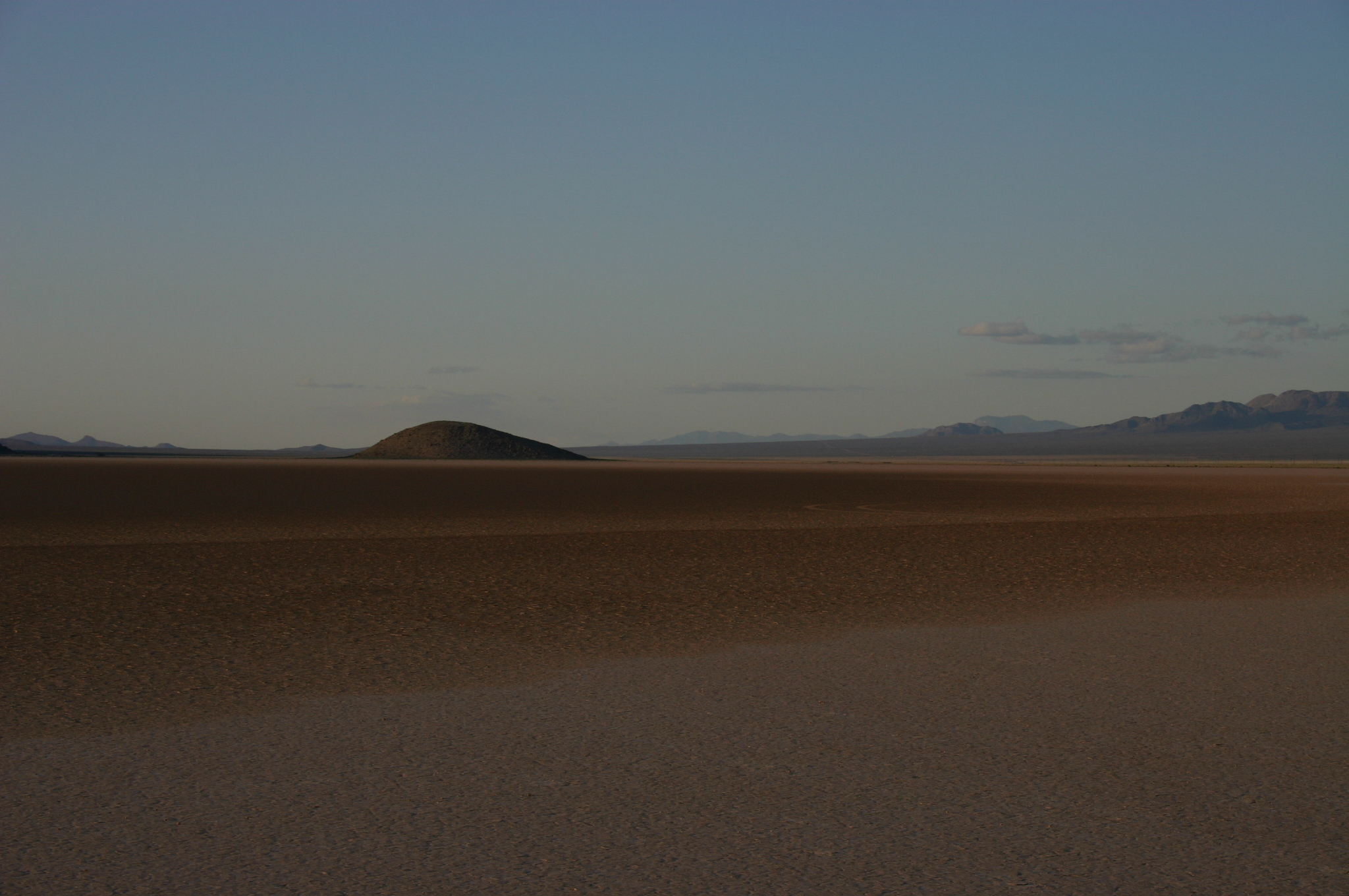 Delamar Dry Lake, Nevada